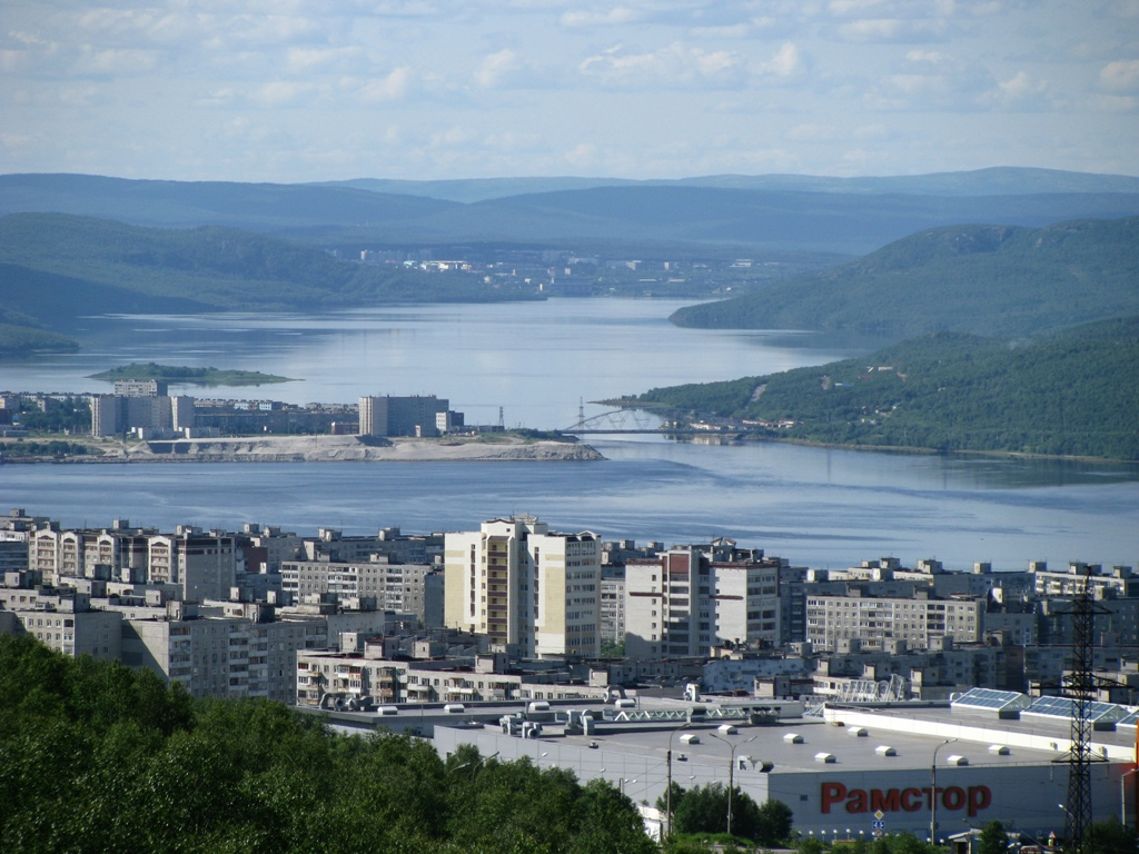 Вид на южные кварталы Мурманска